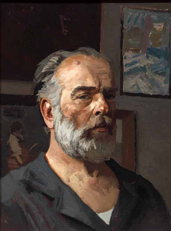 Гелий Коржев. Автопортрет. 1980. Холст, масло. 61×46,5 см